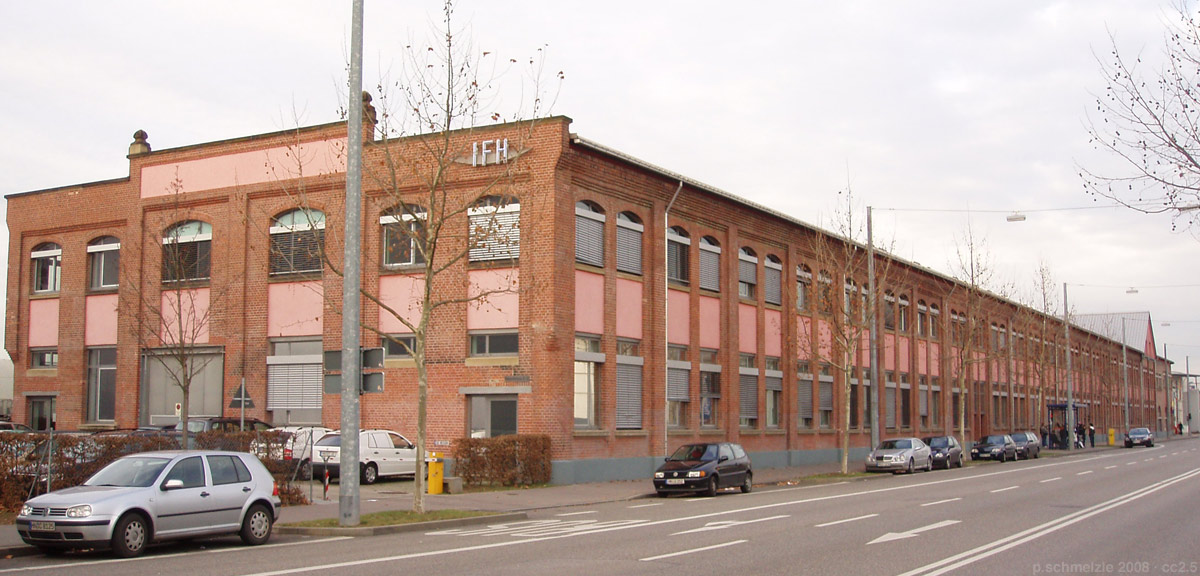 Innovationsfabrik Heilbronn in der historischen Fabrikanlage der Maschinenfabrik Weipert in der Weipertstraße 8–10 in Heilbronn